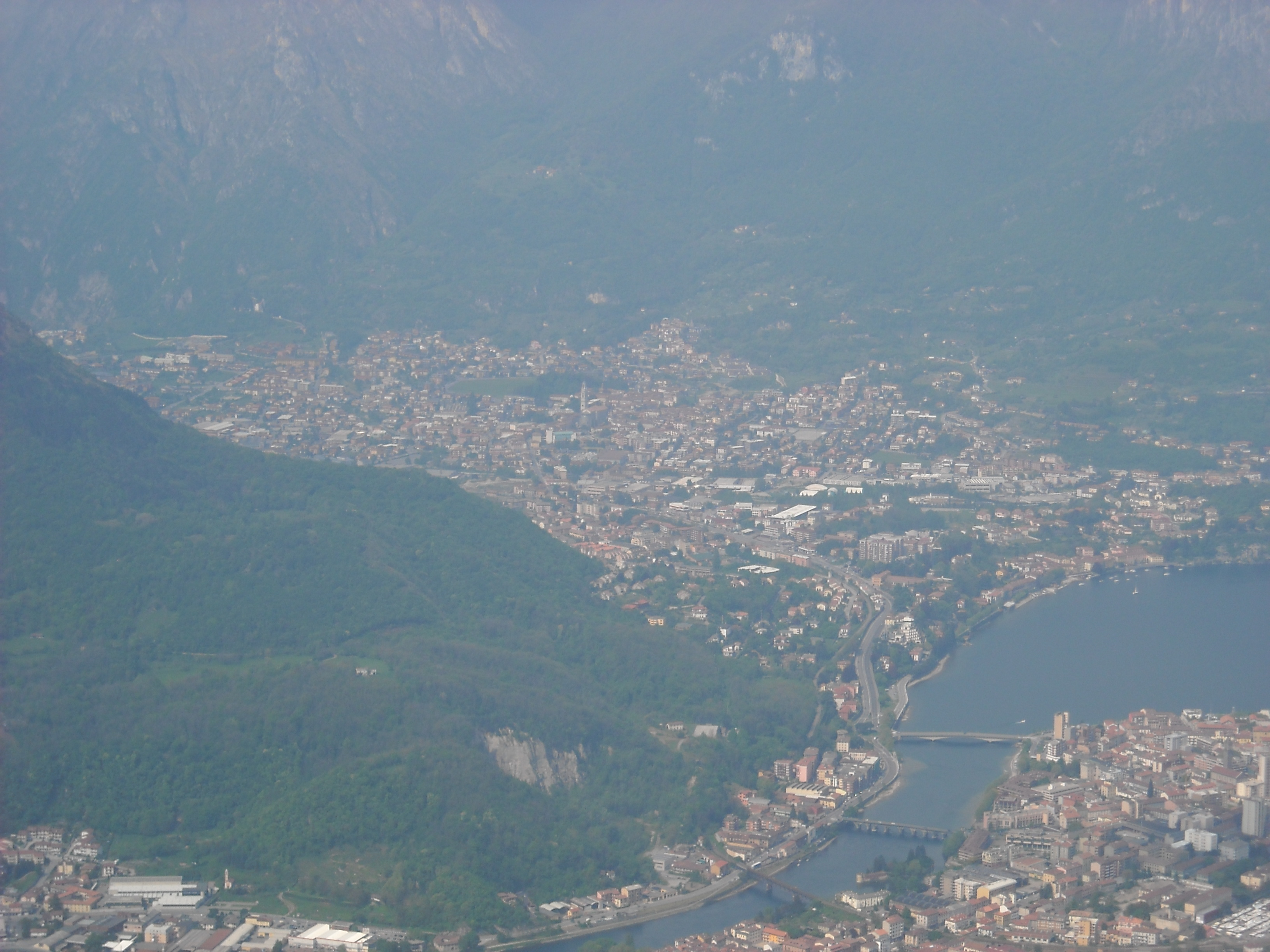 Valmadrera vista dal monte Magnodeno.